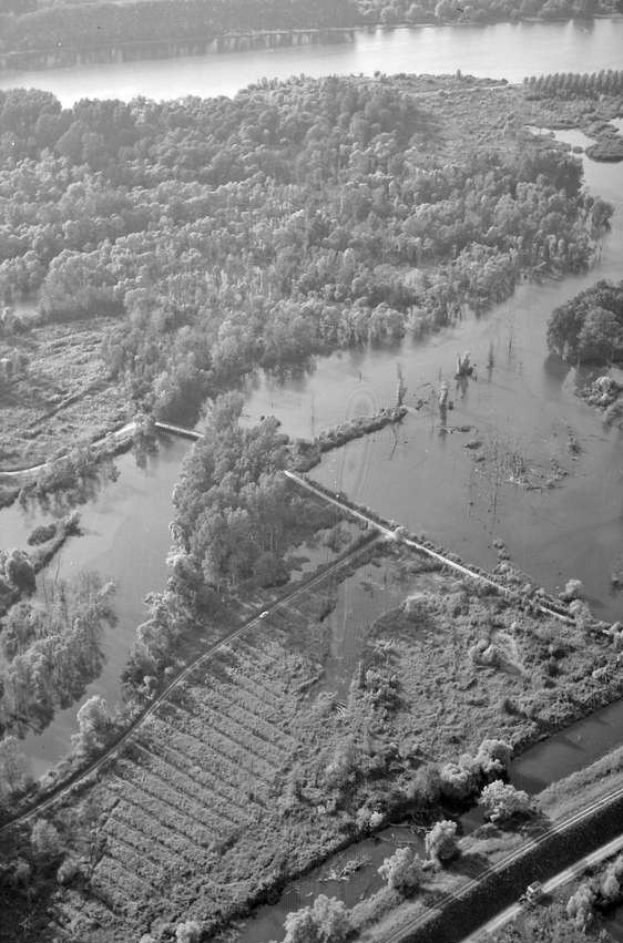 W 134 Sammlung Willy Pragher I: Filmnegative II, Bildordner 311-787 / ca. 1930-1992 Luftbilder [Filmnegative, Ordner 0457] Luftbilder, 1973 Taubergießen